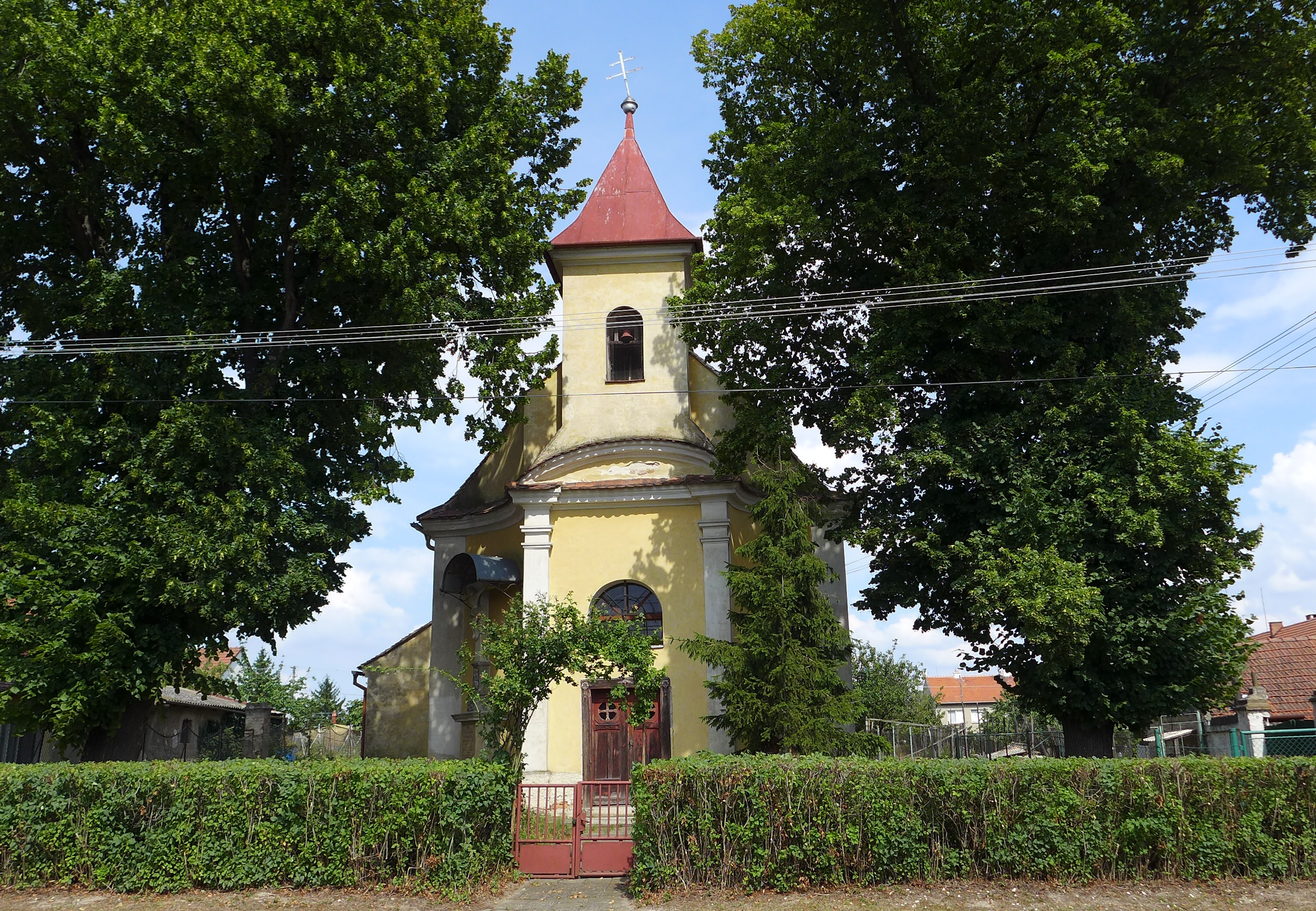 Kaple Panny Marie Pomocné, parc. 1, 435/1, Nová Ves (Pohořelice).